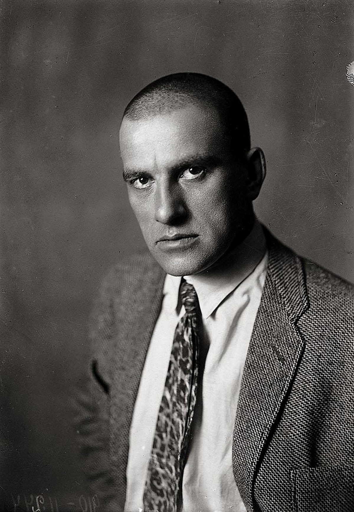 Vlagyimir Vlagyimirovics Majakovszkij (oroszul: Владимир Владимирович Маяковский; Badgadi, 1893. július 19. – Moszkva, 1930. április 14.) orosz-szovjet költő, drámaíró, az orosz futurizmus egyik megalapítója.